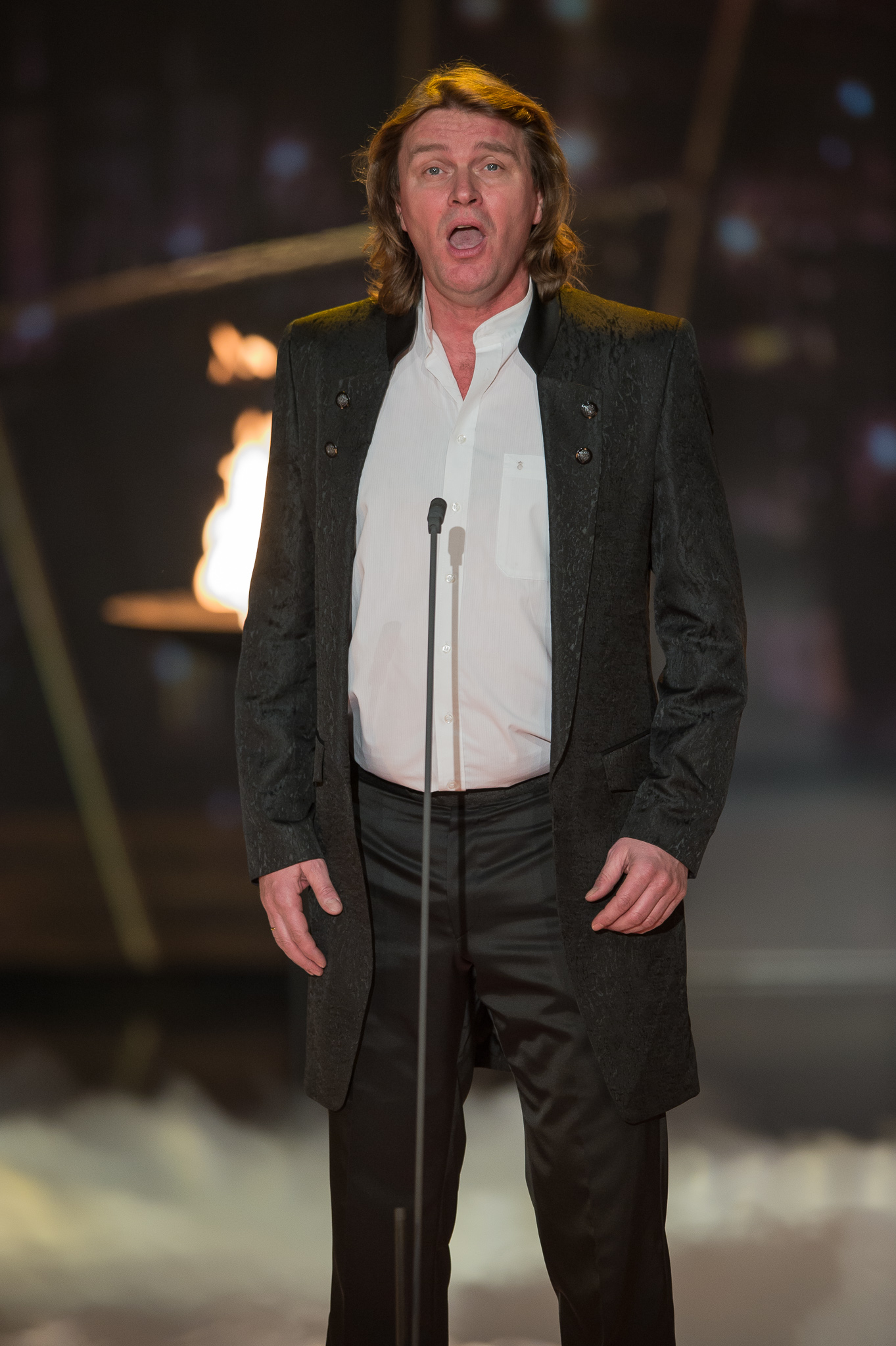 BR,Bayerisches Fernsehen,Frankenhalle,Klaus Florian Vogt,Live-Sendung,Sternstunden-Gala,Sternstundengala